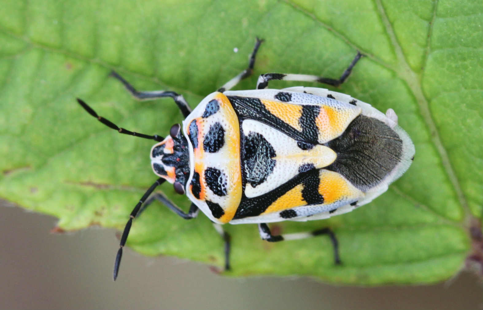 Eurydema ornata (Farbmorphe mit weißlich-gelber Grundfarbe) am 30.6.2017 in der Schwetzinger Hardt